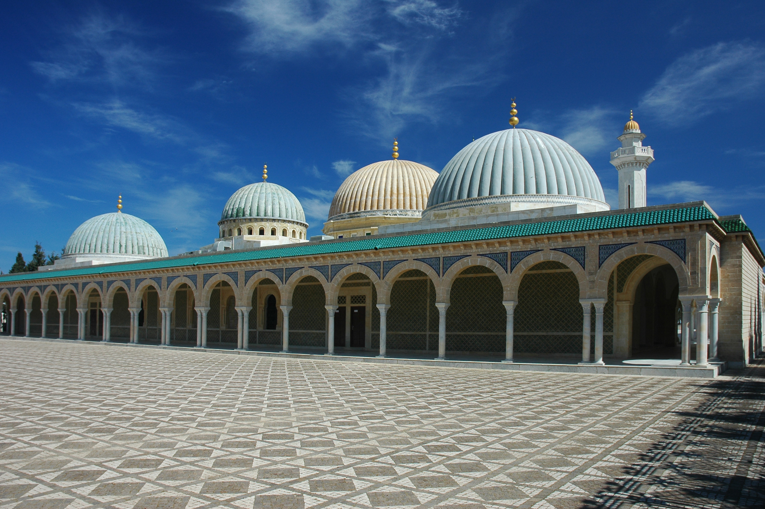 Mausolée Habib Bourguiba à Monastir en Tunisie.